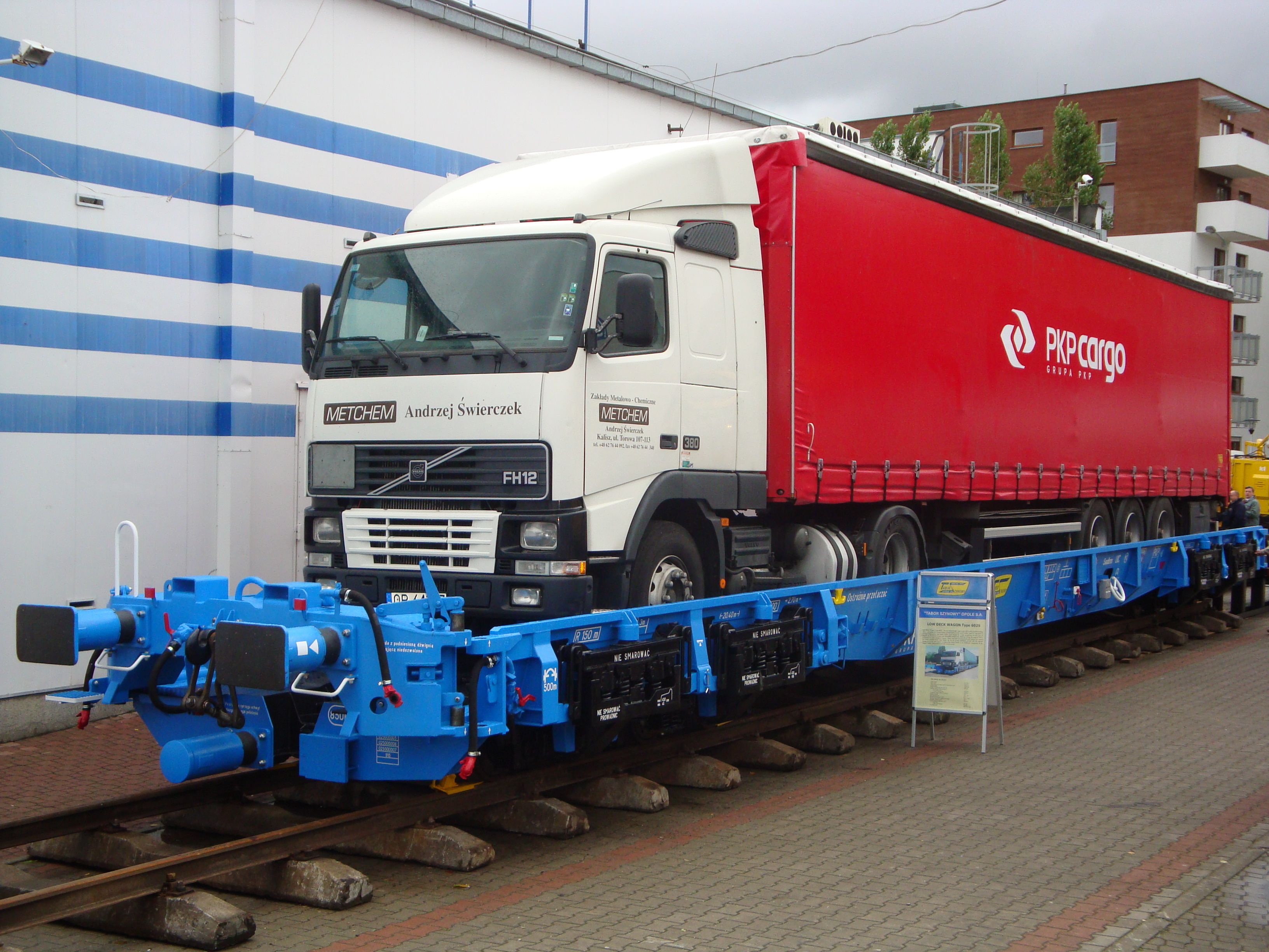 Platforma do przewozu ciężarówek prezentowana przez "Tabor Szynowy Opole S.A." podczas targów "Trako" w Gdańsku.